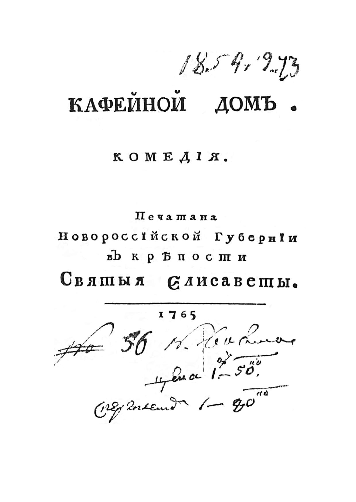 Титулка Кафейной домъ 1765 р.